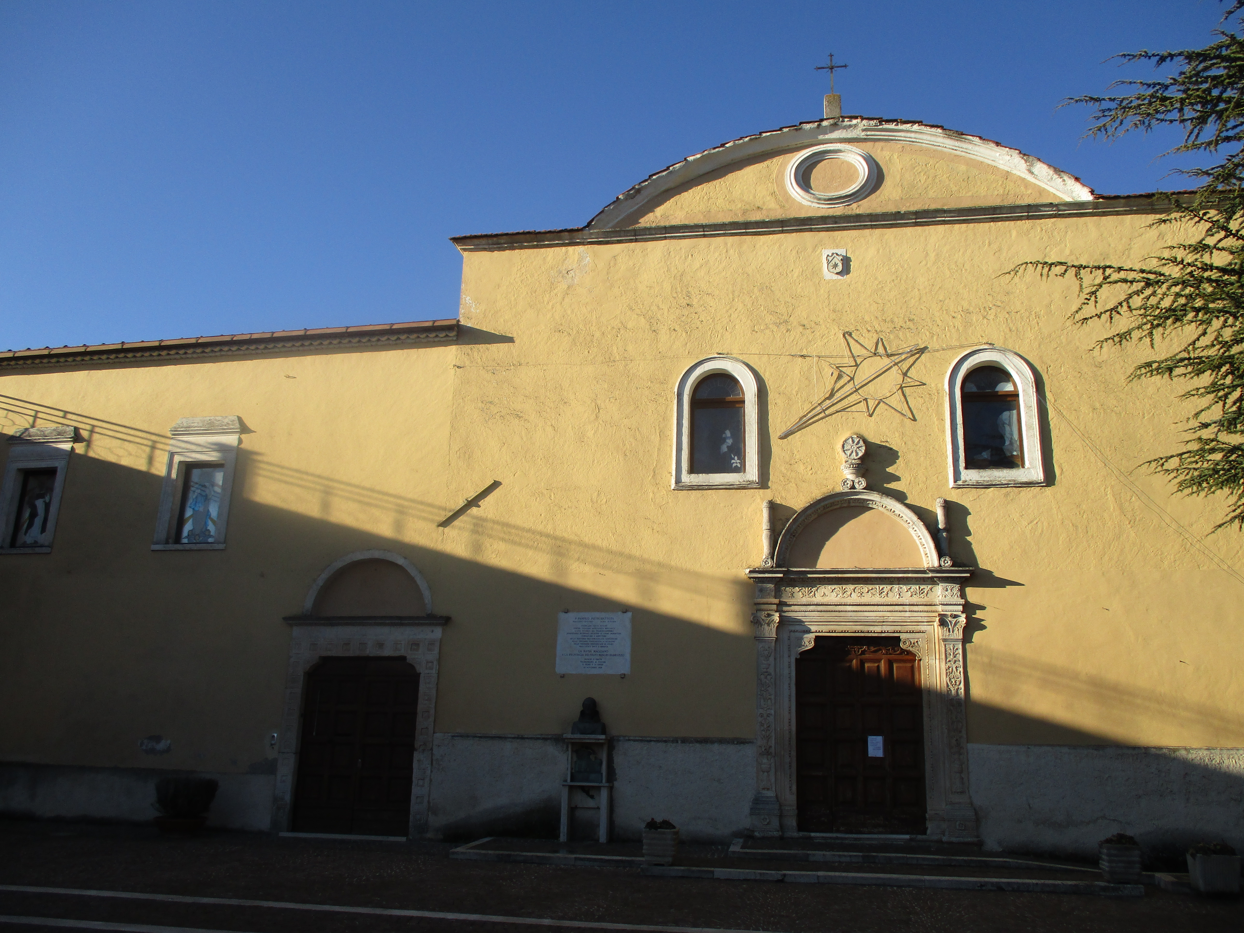 Chiesa e convento di San Domenico